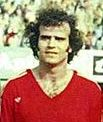 Tahar Chaïbi